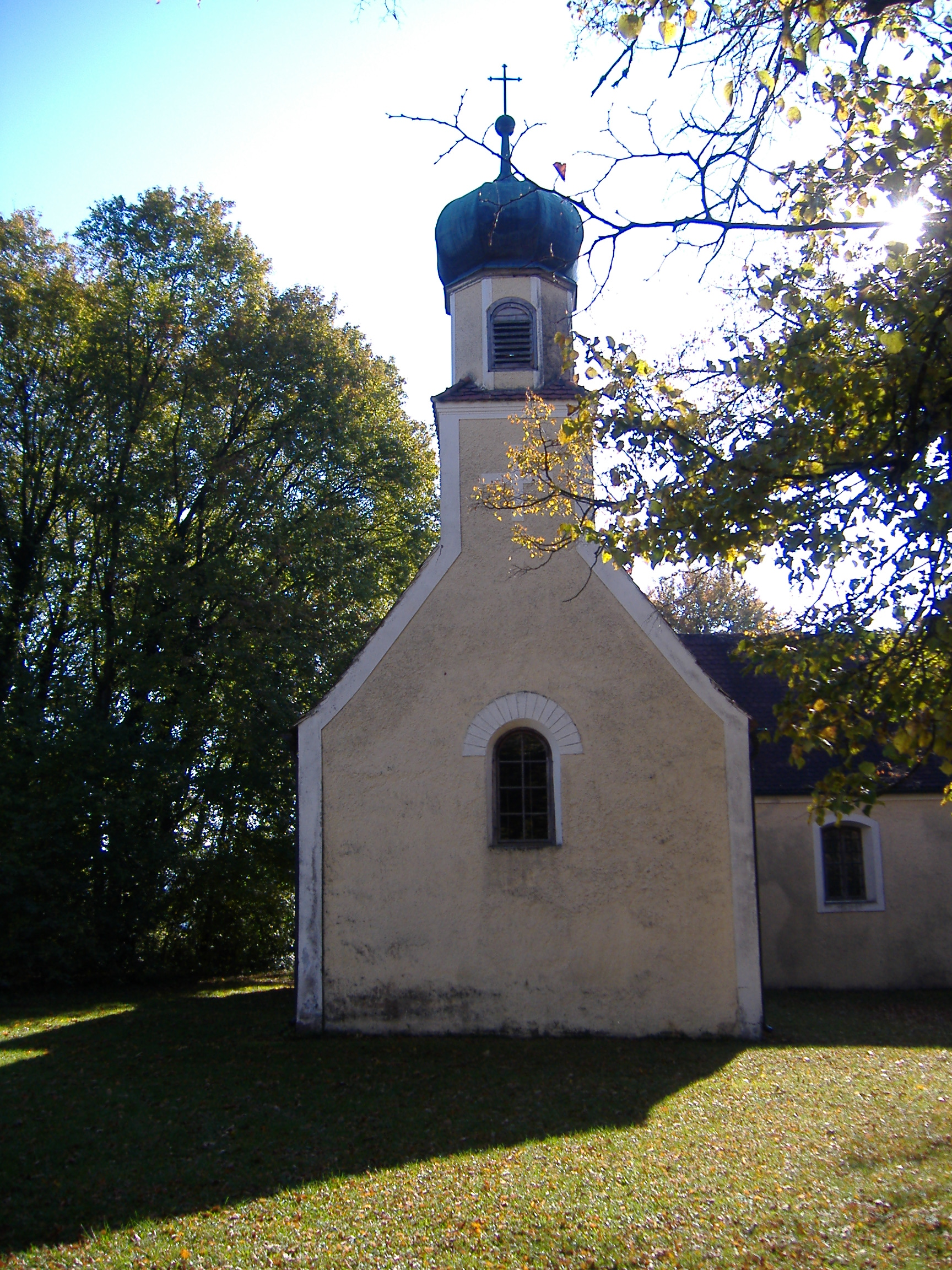 Stepperg